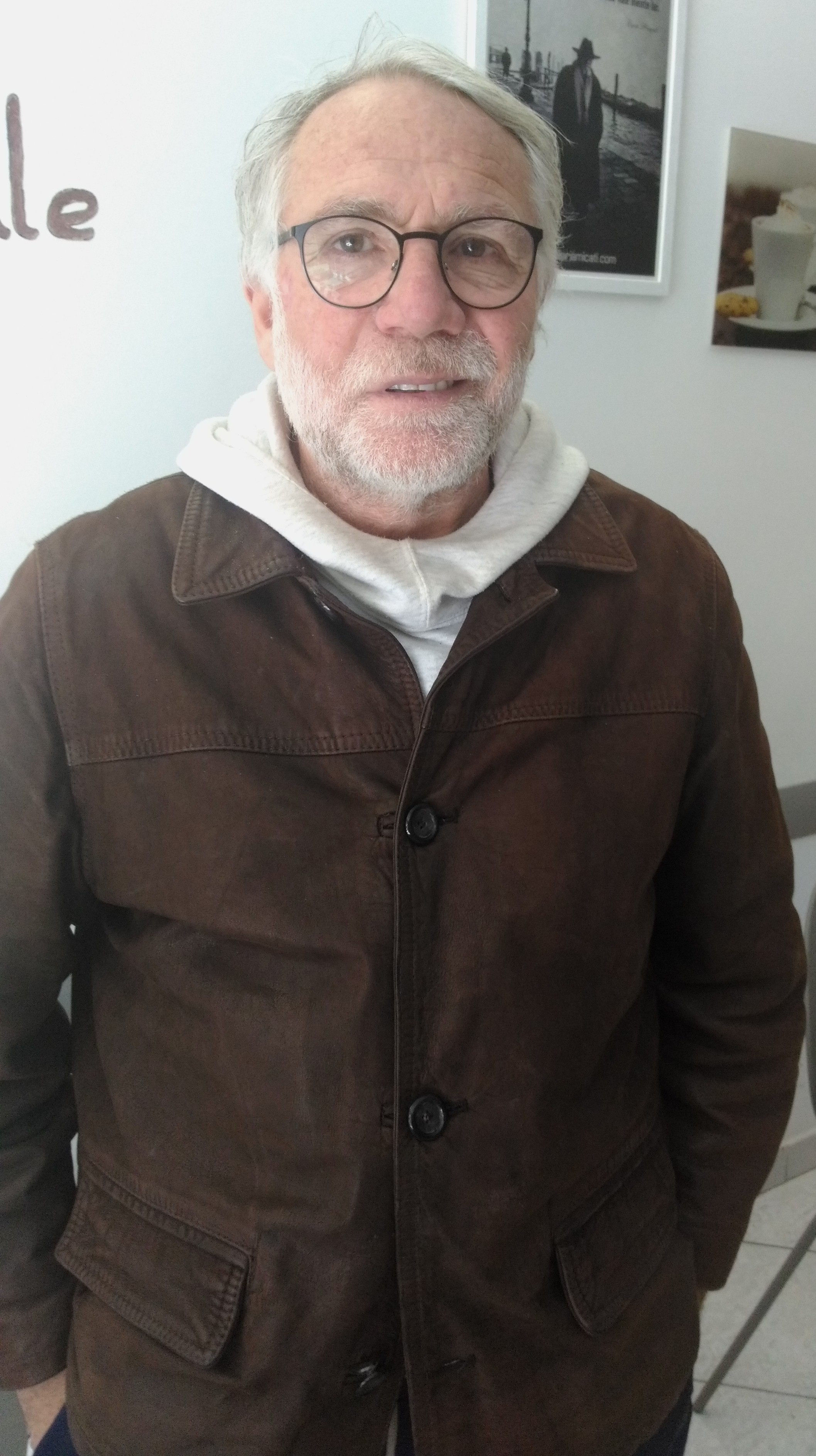 Benedetto Lo Monaco, attore